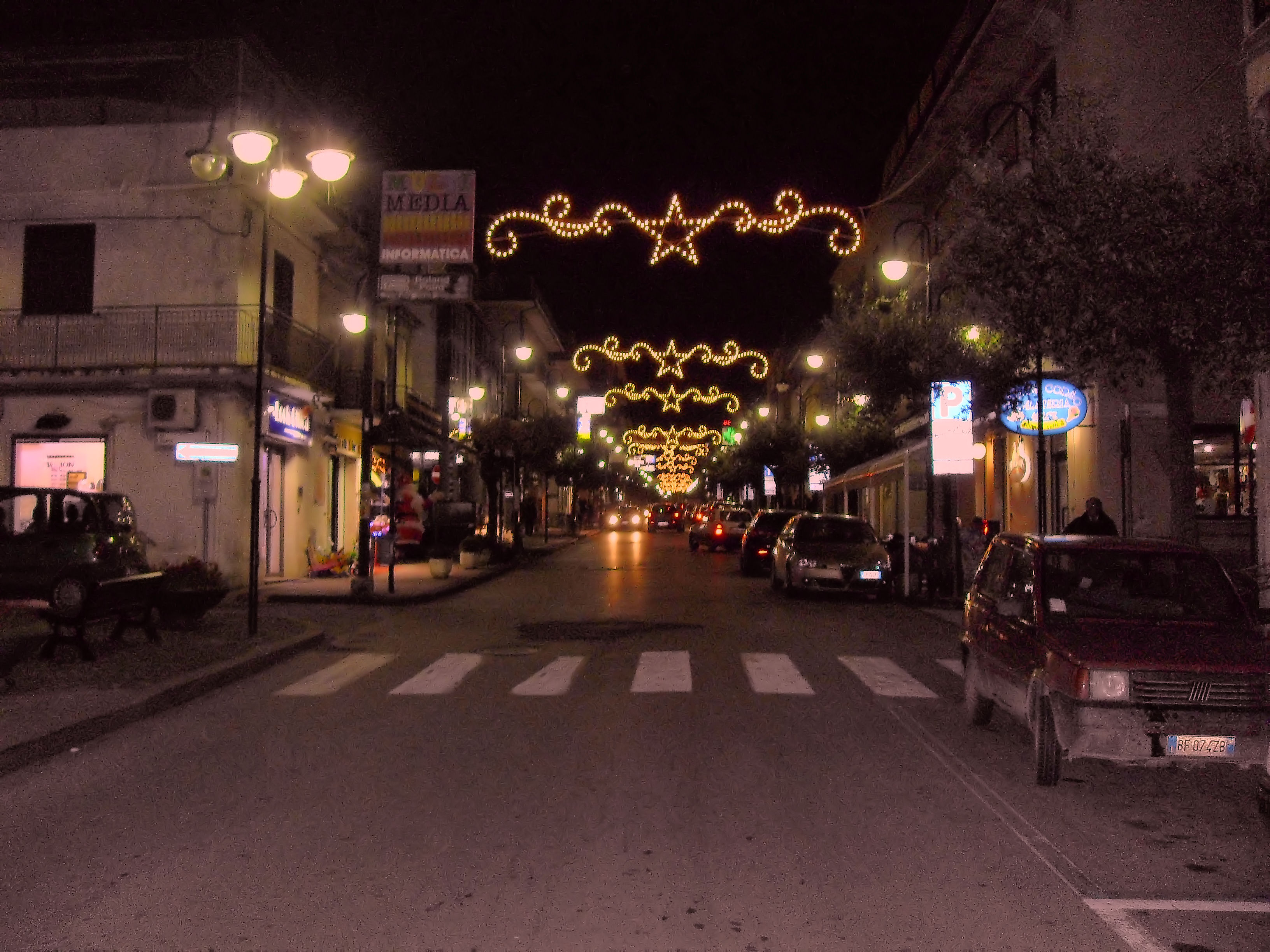 Corso Italia in Campora San Giovanni durante le Feste Natalizie 2010